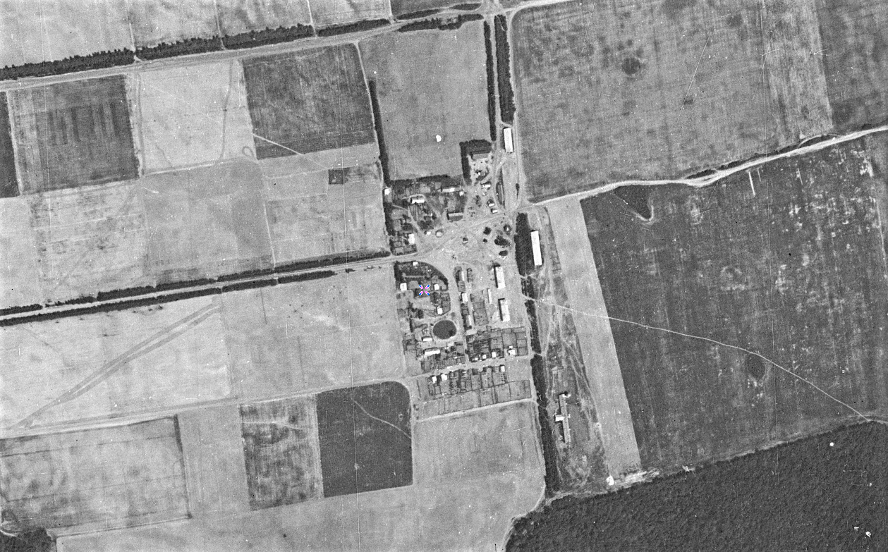 Поселок Семхоз (Казань) на снимке с американского разведывательного спутника (7 июня 1966)